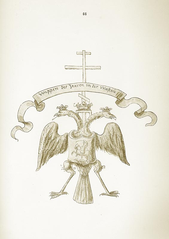 Царский герб